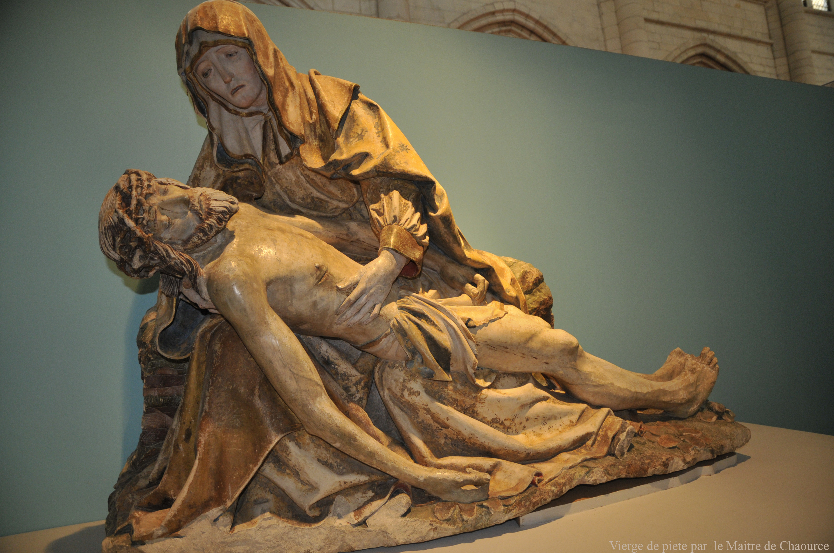 Vierge de pitié, pièce essentielle faite par celui qu'on a désigné par le nom de Maître de Chaource église de Bayel- vers 1515-1525, calcaire polychromé